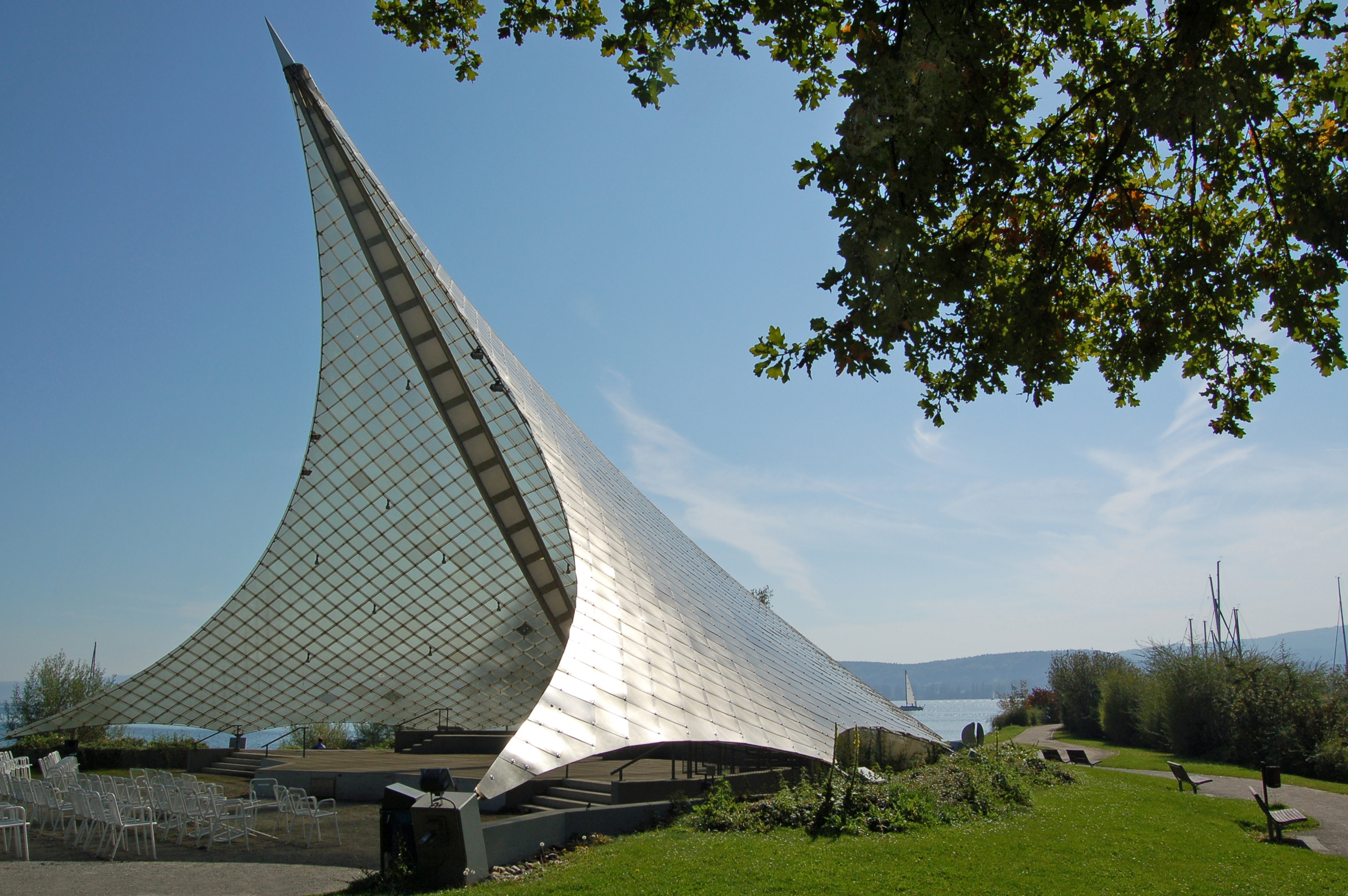 Die Freilichtbühne steht nahe dem Hafen an der Promenade und wird für diverse Festivalitäten genutzt und ist auch ein echter Blickfang.